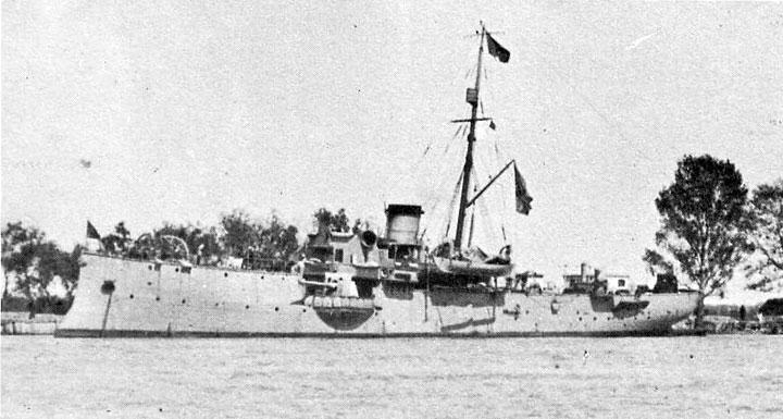 КЧ "Кубанец", в роки світової війни.